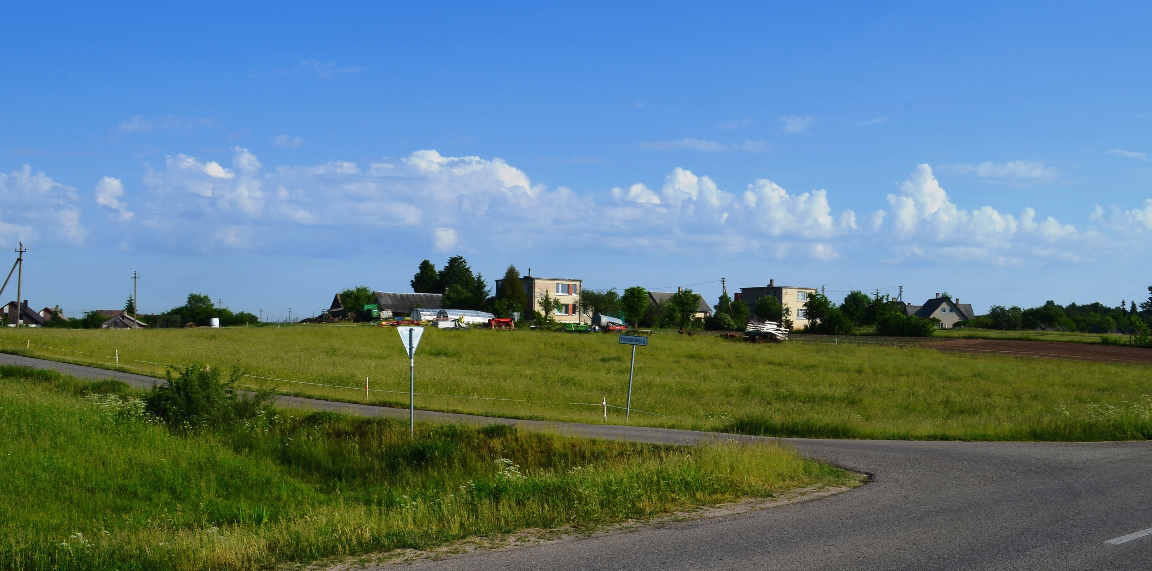 Veriškės, Vilniaus raj.